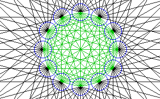 Die Unsichtbarkeit mit Mikro-Kameras die zugleich auch Mikro-Projektoren sind. Die zwölf blauen Kreise stellen die Mikro-Kamera-Projektoren dar, in der Realität werden aber einige hunderttausend davon benötigt. Die schwarzen Linien aussen stellen die Lichtstrahlen dar. Die grünen Linien innen stellen die Zuordnung der Bildsignale dar, aber keineswegs ein Drahtgeflecht, das die Kamera-Projektoren verbindet.